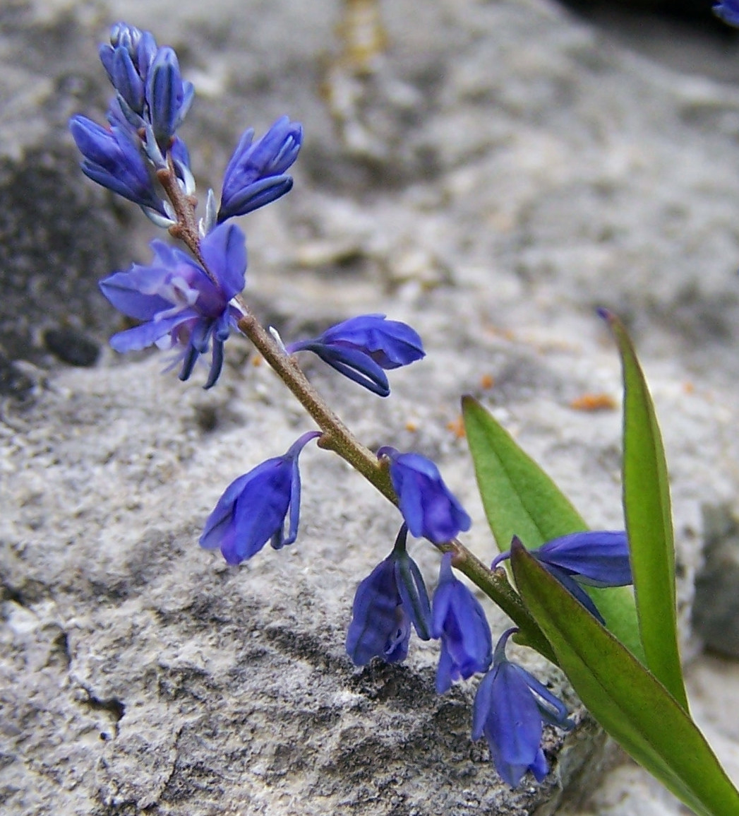 Polygala amara (pl. krzyżownica górska), habitat: Tatra Mountains, Hala Upłaz)